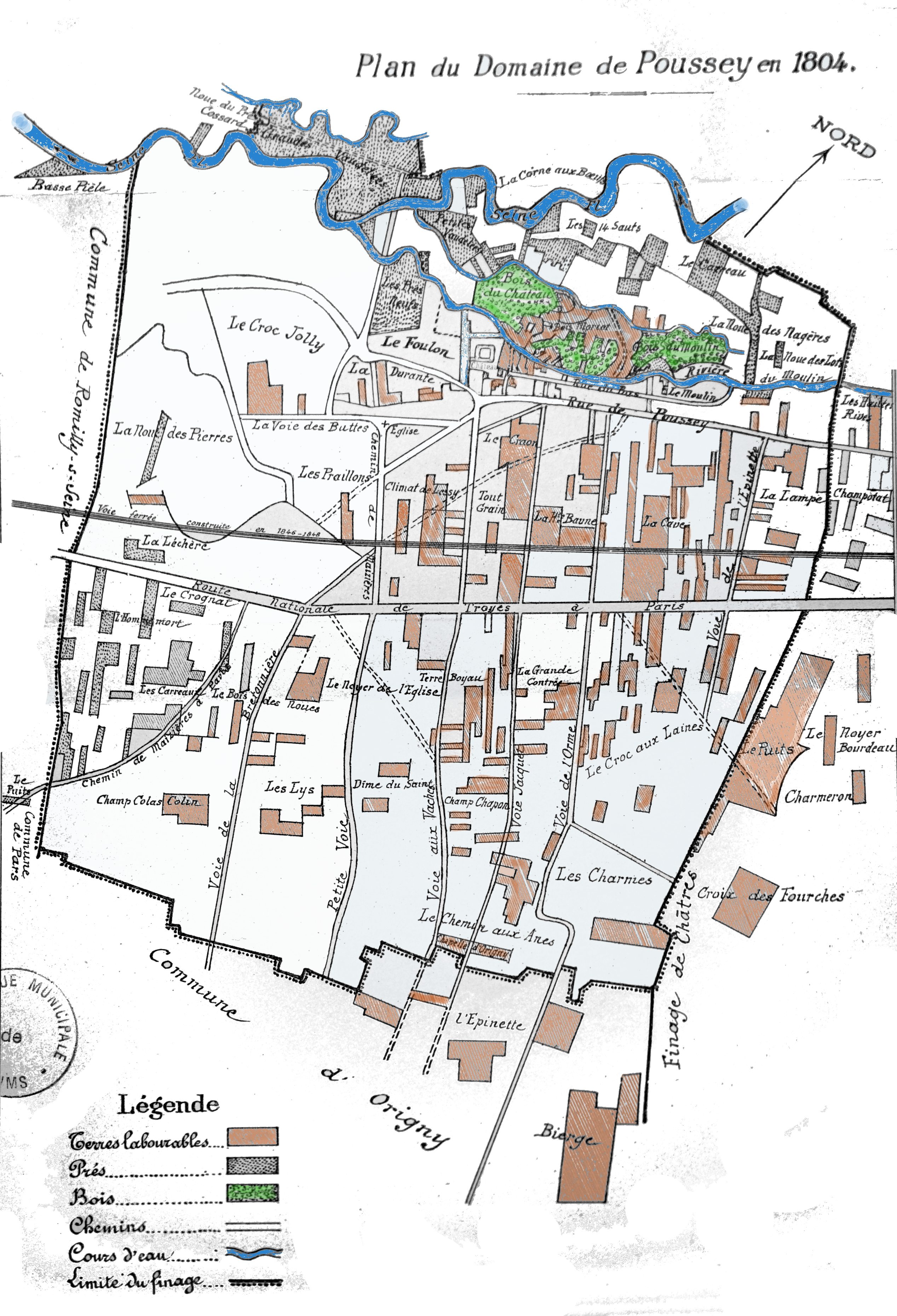 domaine et Château de Poussey